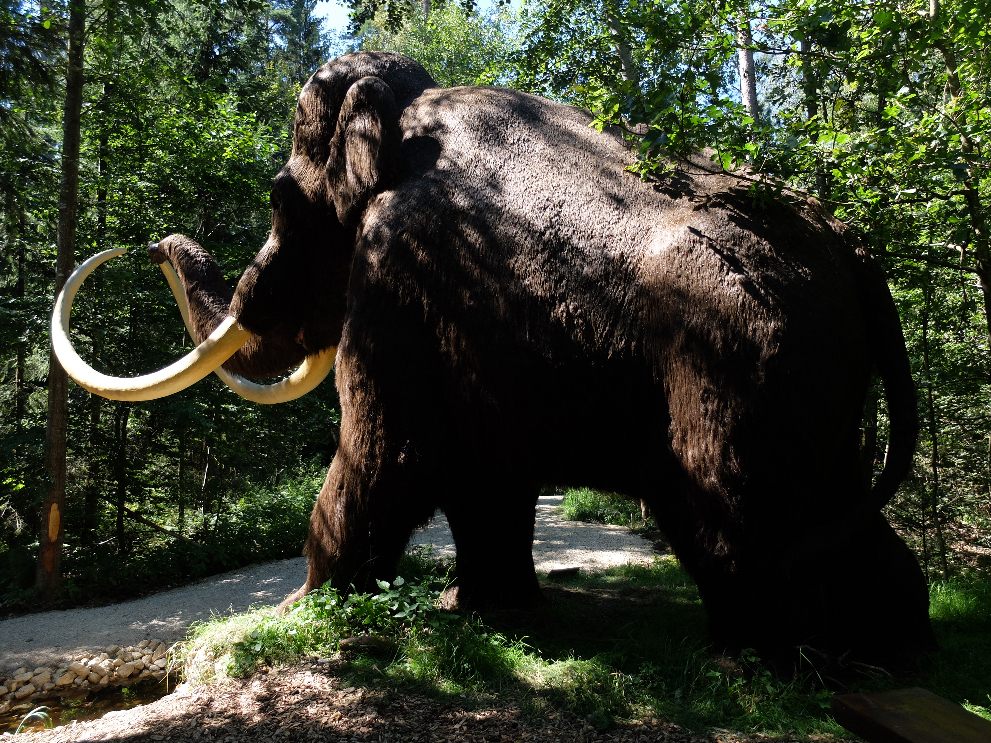 Mammut Dinopark Denkendorf